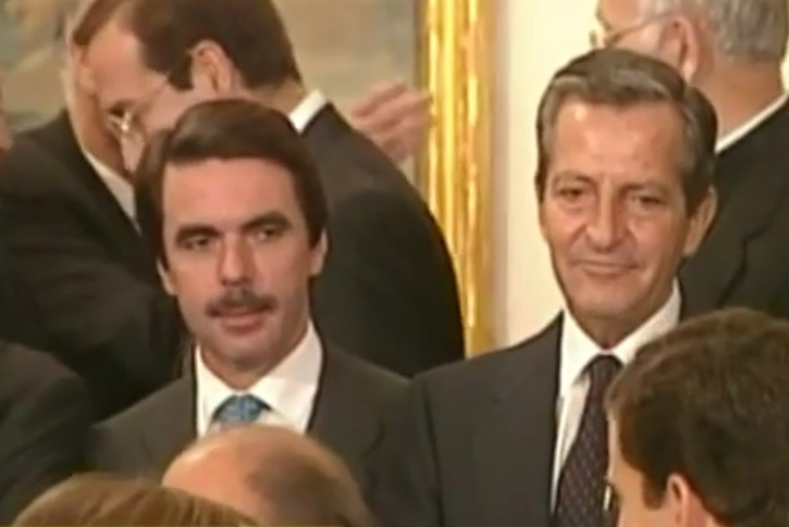 José María Aznar y Adolfo Suárez (22 de noviembre de 1995).